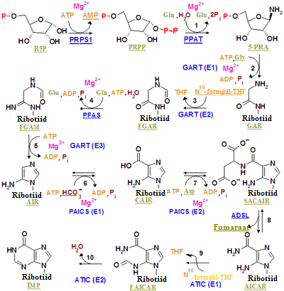 IMP süntees